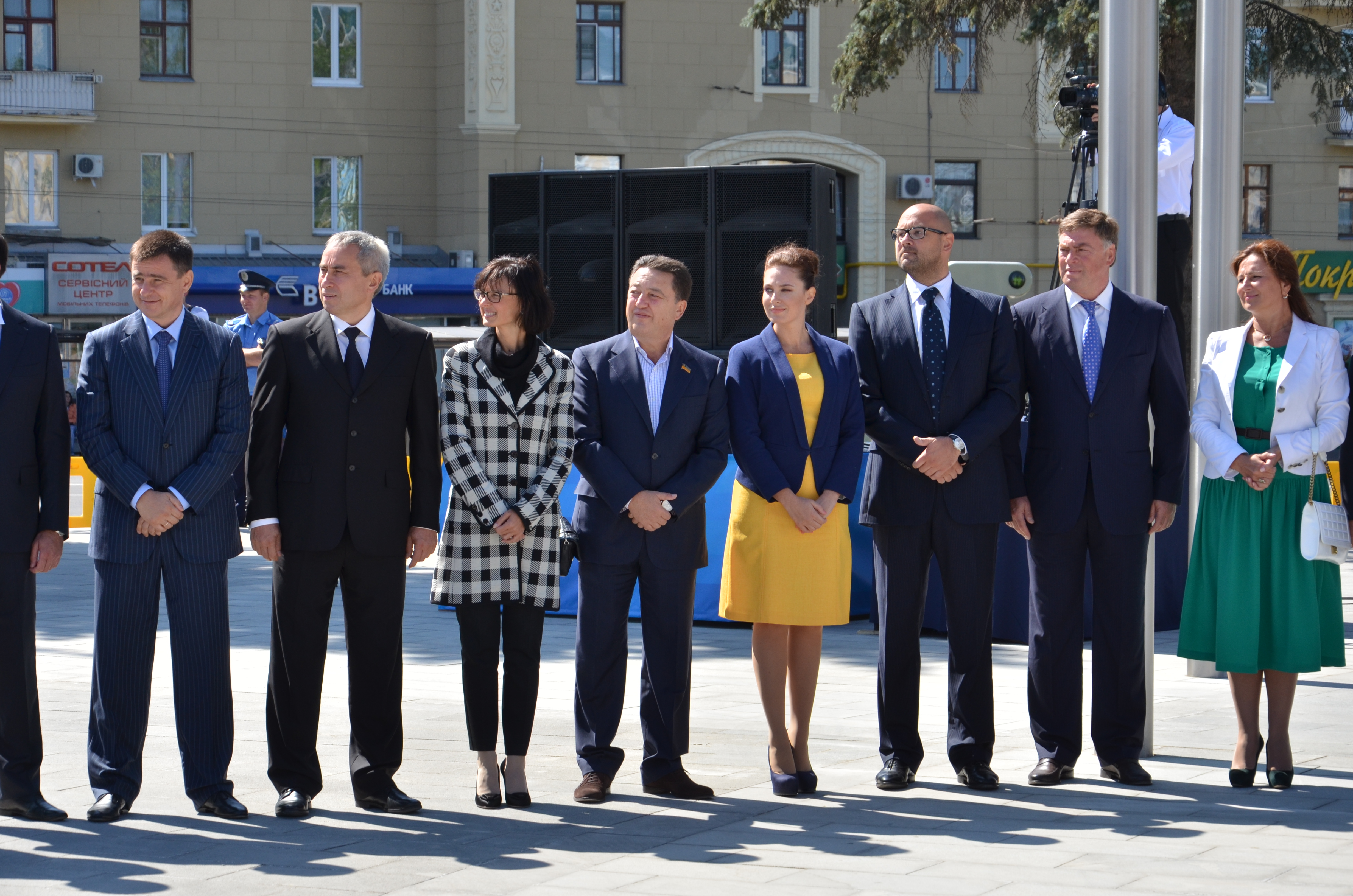 Дмитрий Святаш и другие харьковские политики на открытии Монумента Независимости в харькове